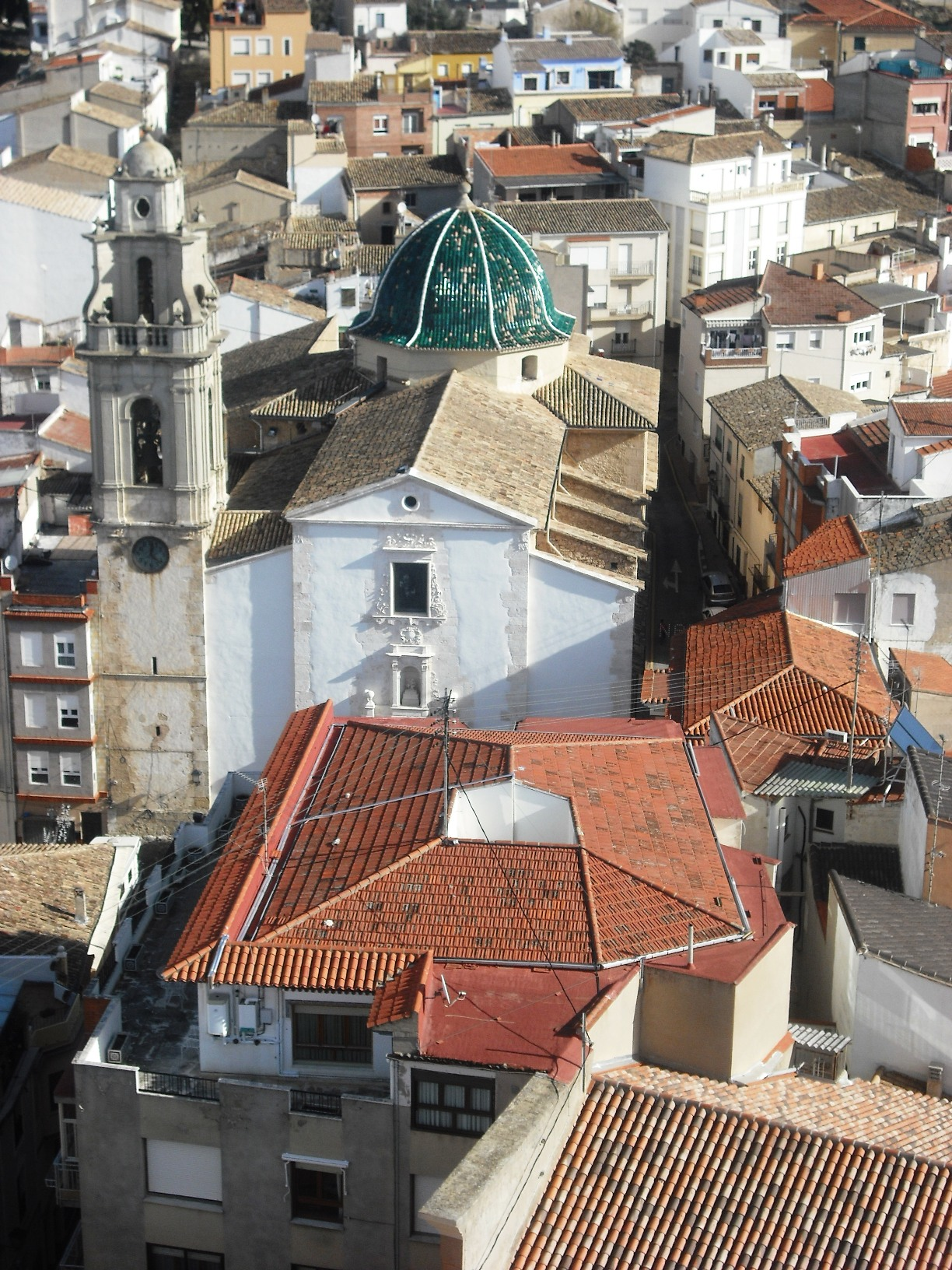 Església de la Misericòrdia.